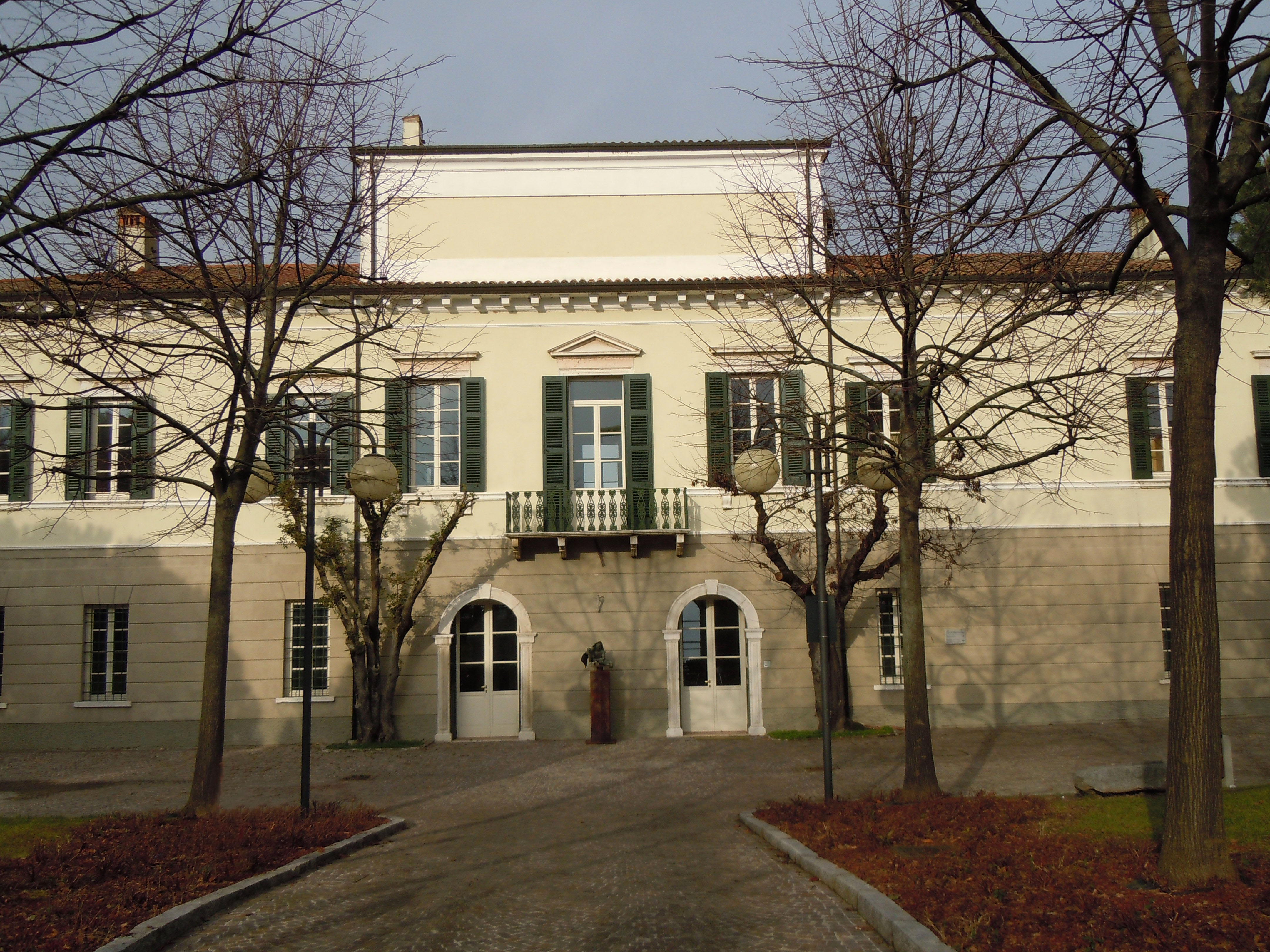 Rivoltella del Garda, Villa Martina